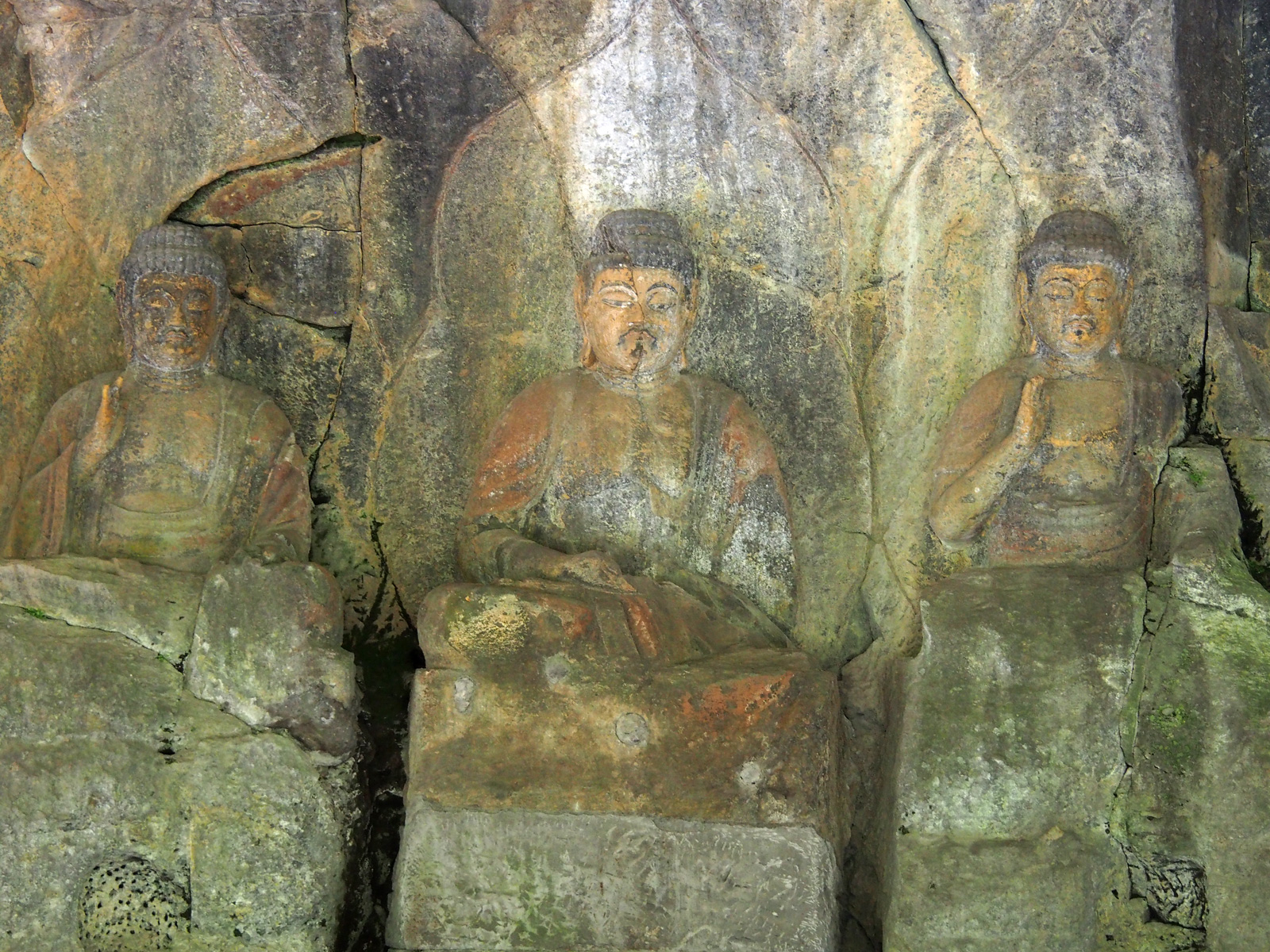 臼杵磨崖仏ホキ石仏第一群第二龕（大分県臼杵市）